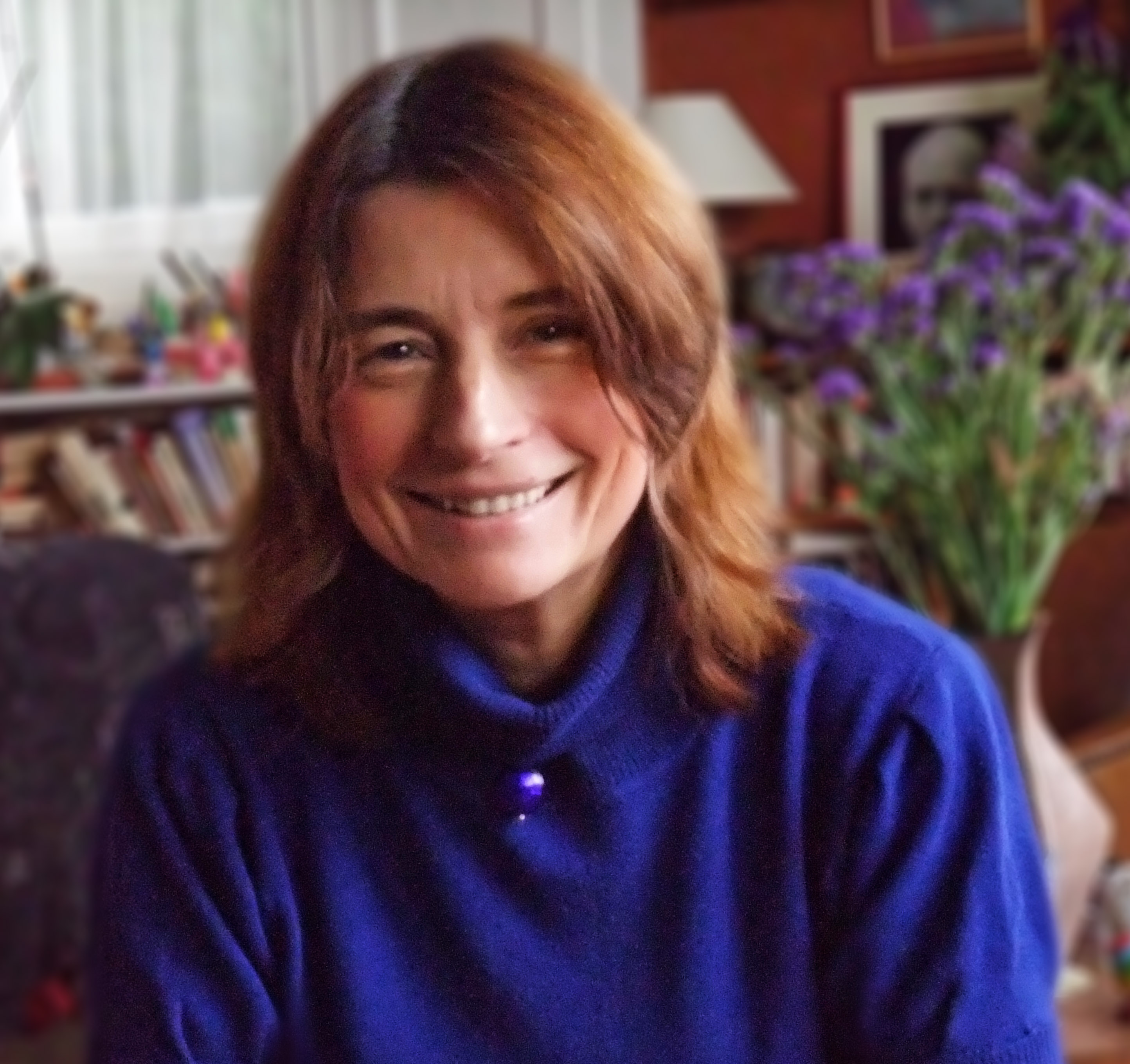 Béatrice Commengé